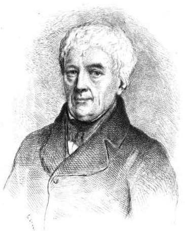 Gabriel Peignot